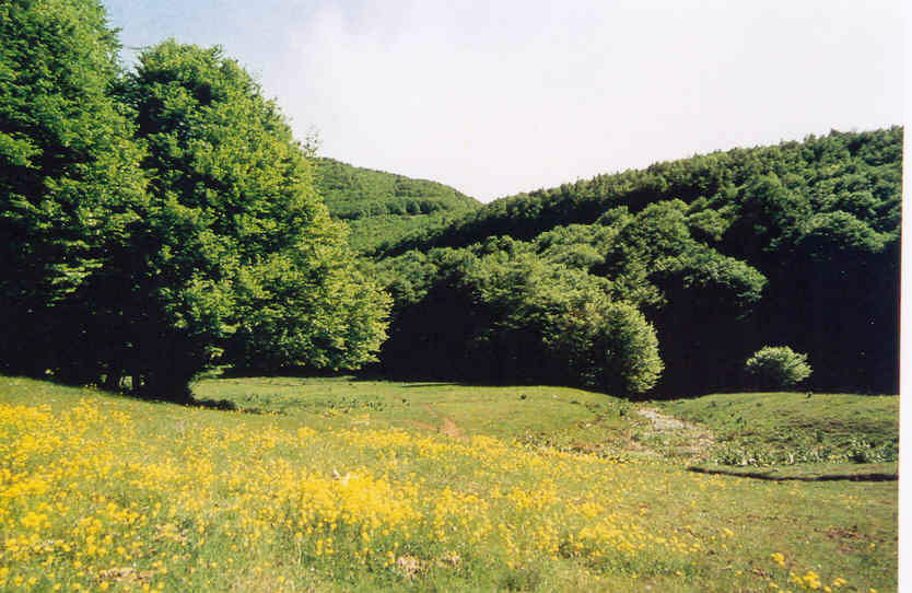 Ενδημική βλάστηση Βιτσίου